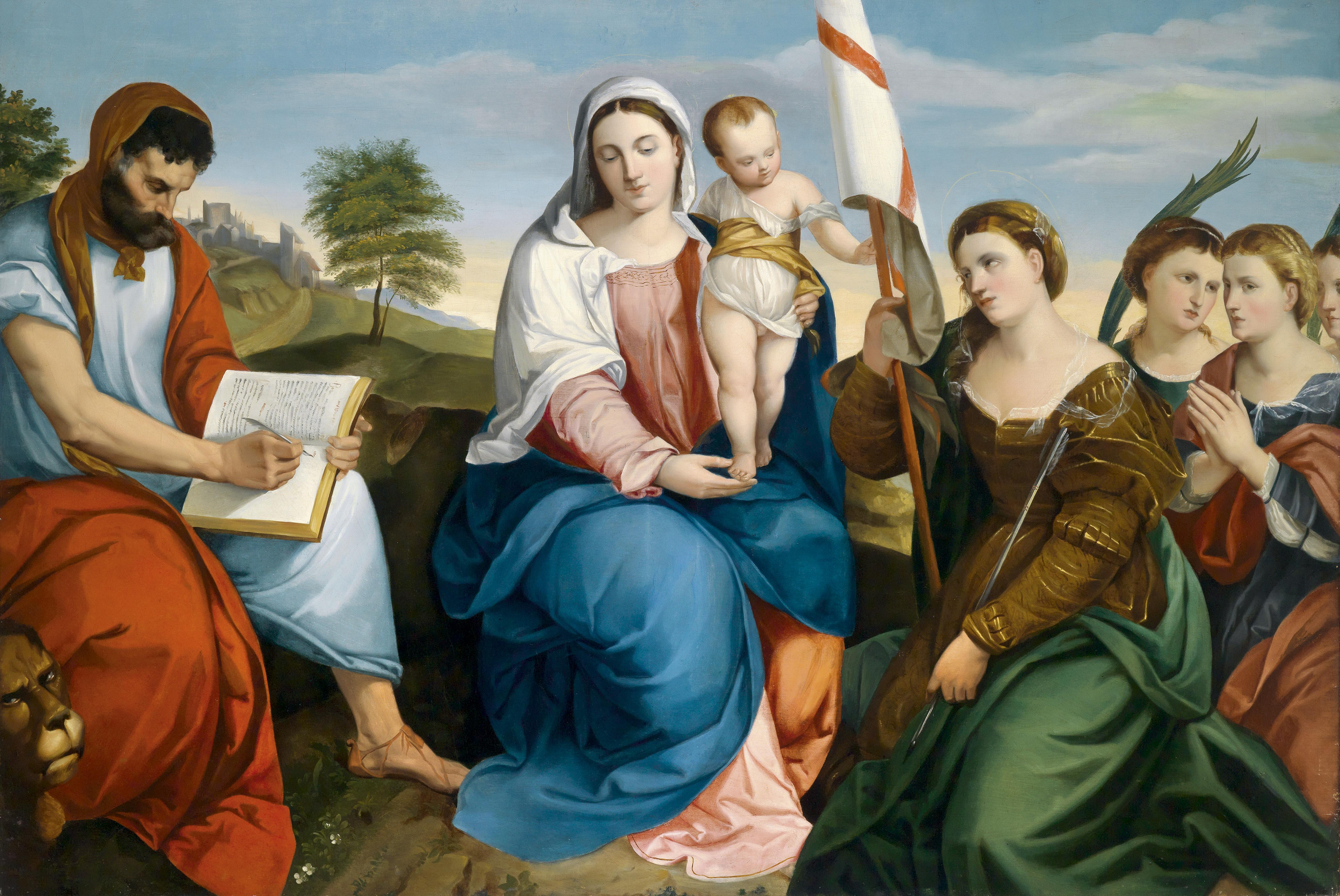 Madonna mit Kind und dem Heiligen Markus Evangelista, sowie Ursula mit Jungfrauen